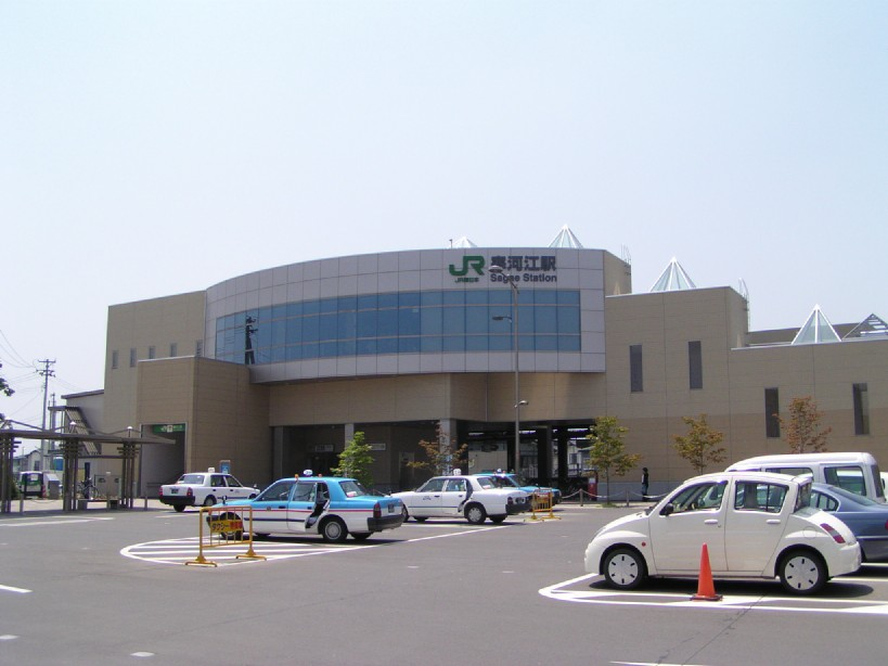 Sagae Station, Sagae, Yamagata, Japan